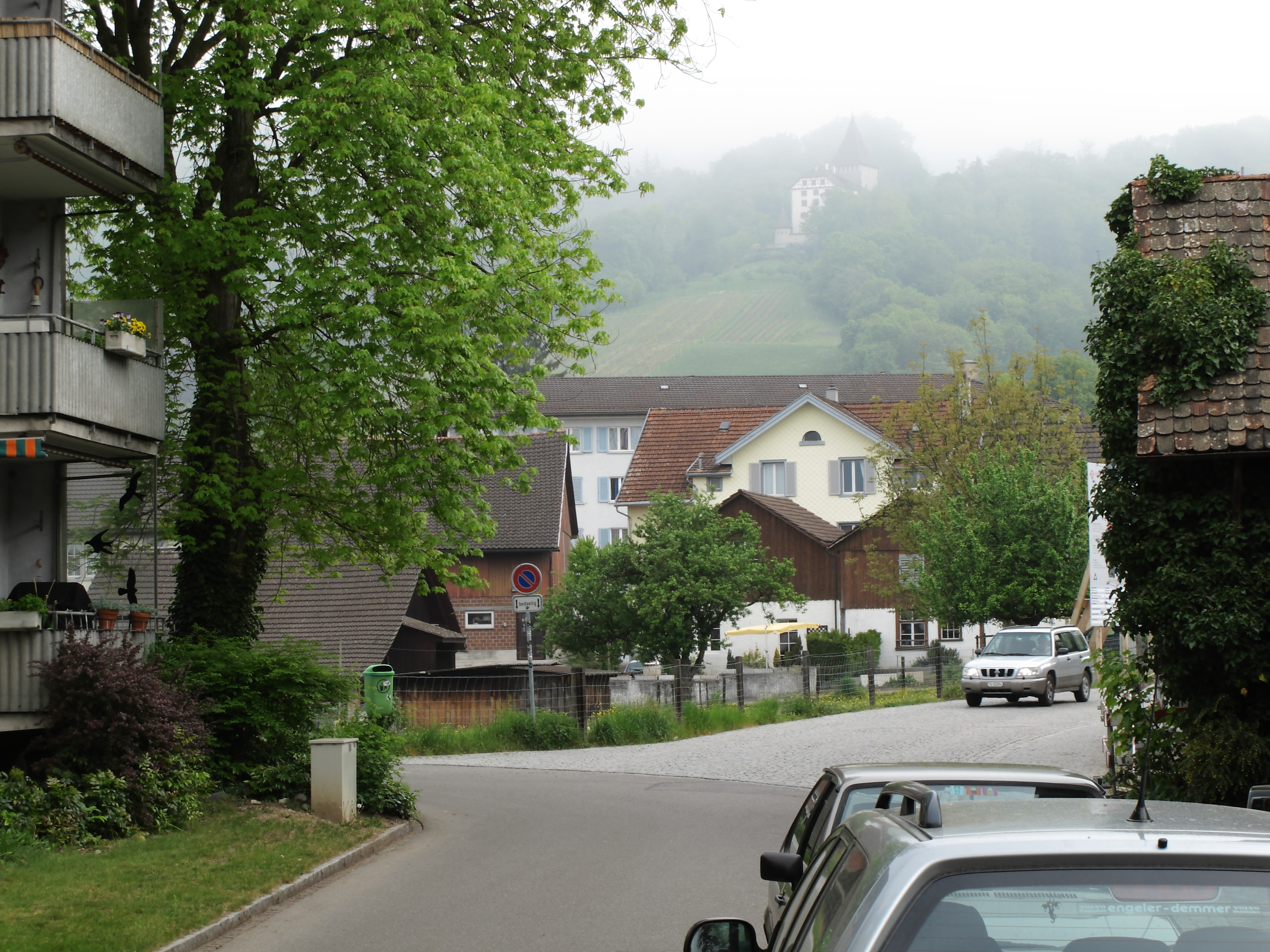 Weinfelden, Storchenstrasse. Im Hintergrund das Schloss Weinfelden (Apr. 2011)